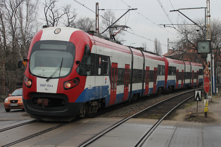 Elektryczny zespół trakcyjny EN97-014 wjeżdża na przystanek Tworki.